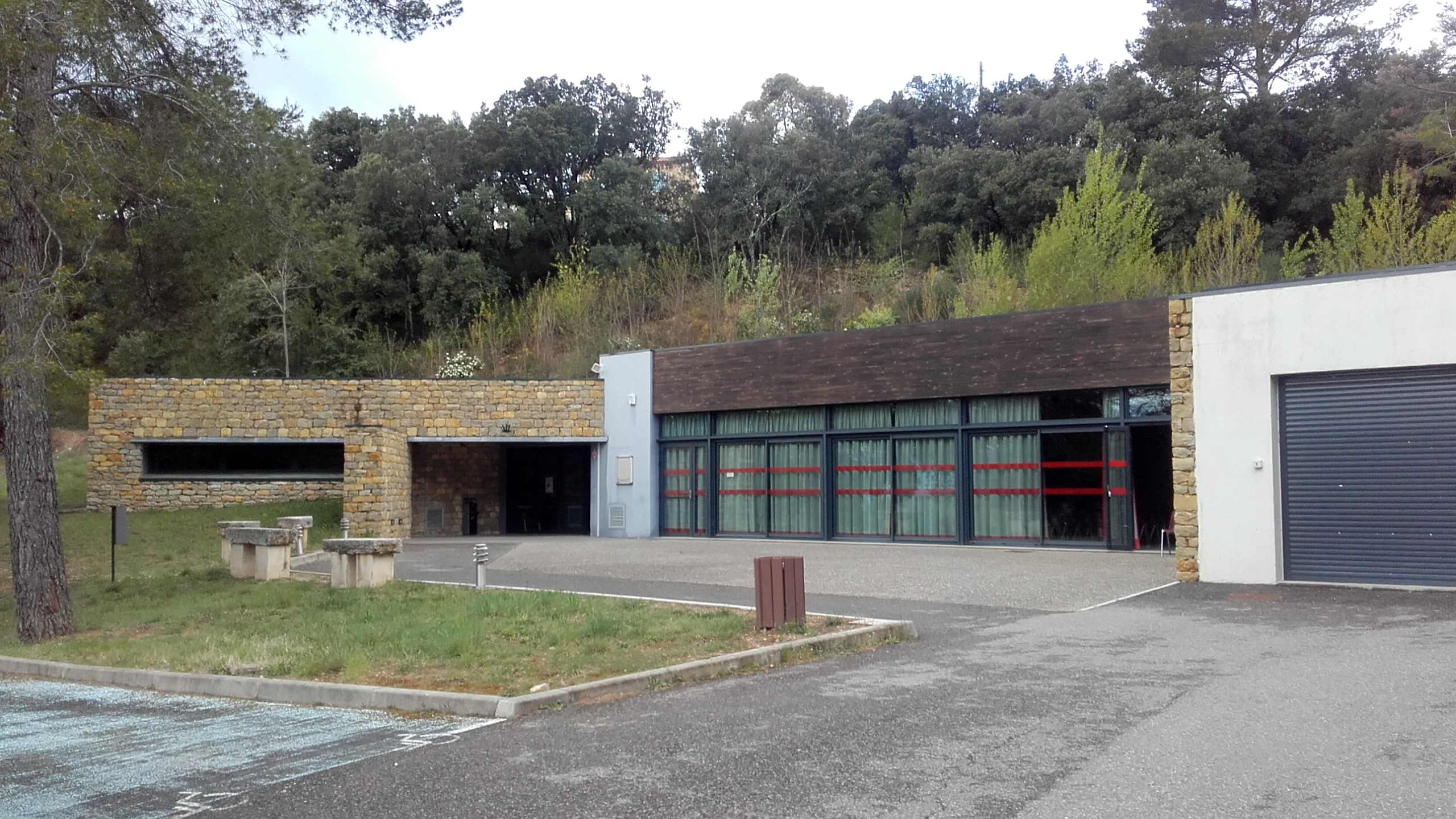 Var, Moissac-Bellevue, Salle de la Combe